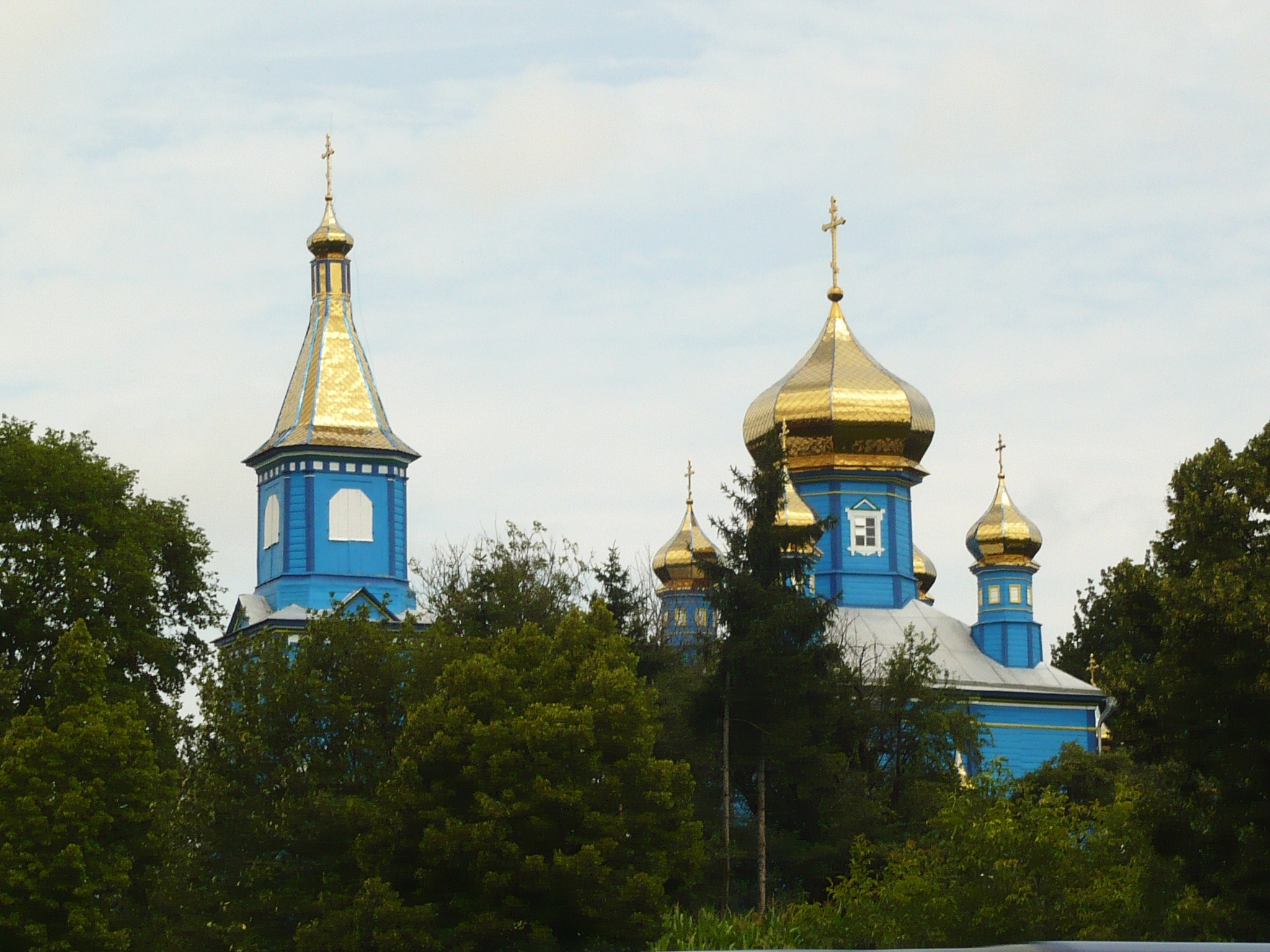 Wiśniowiec, cerkiew